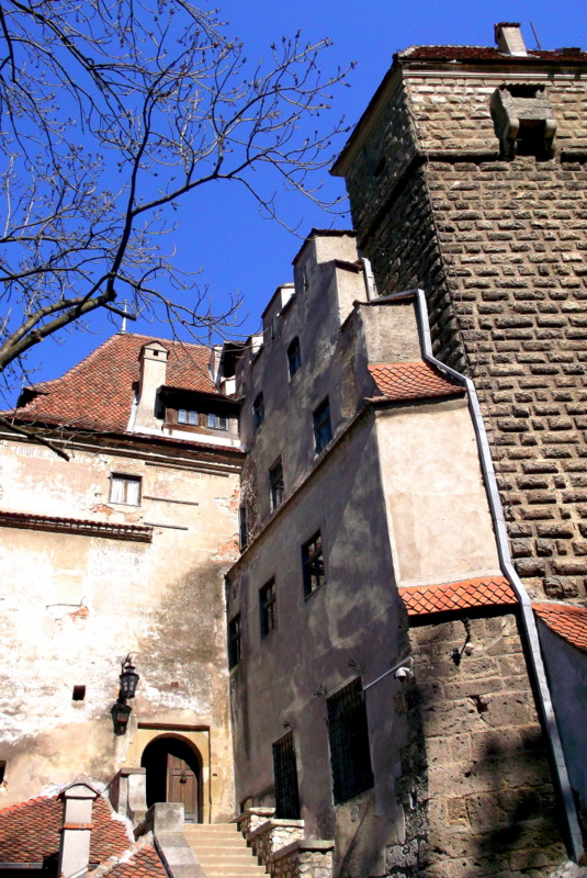 Bran, wejście do zamku